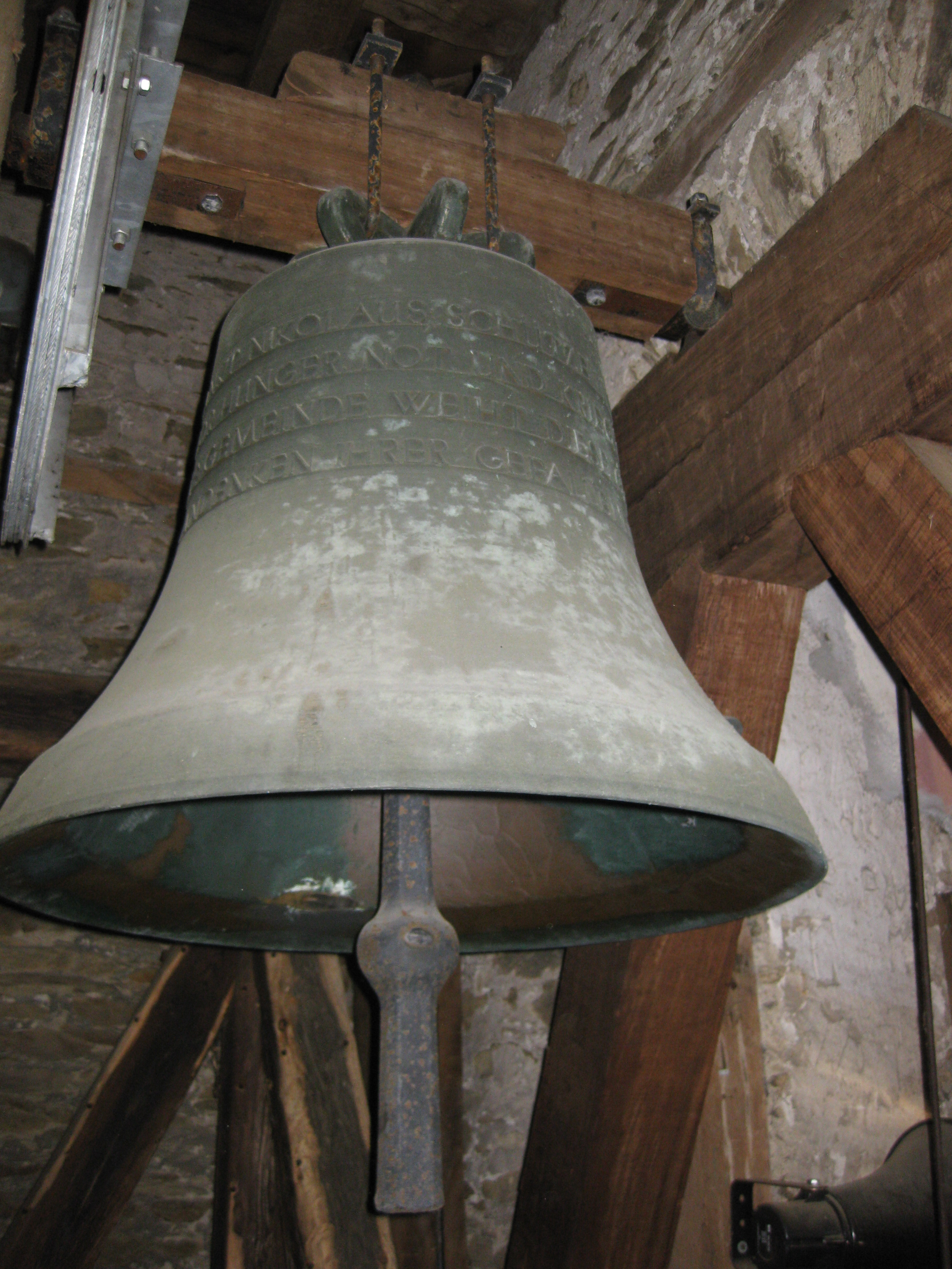 St. Nikolaus-Glocke in der Pfarrkirche St. Nikolaus in Haintchen im Taunus